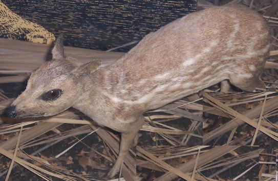 Mouse deer